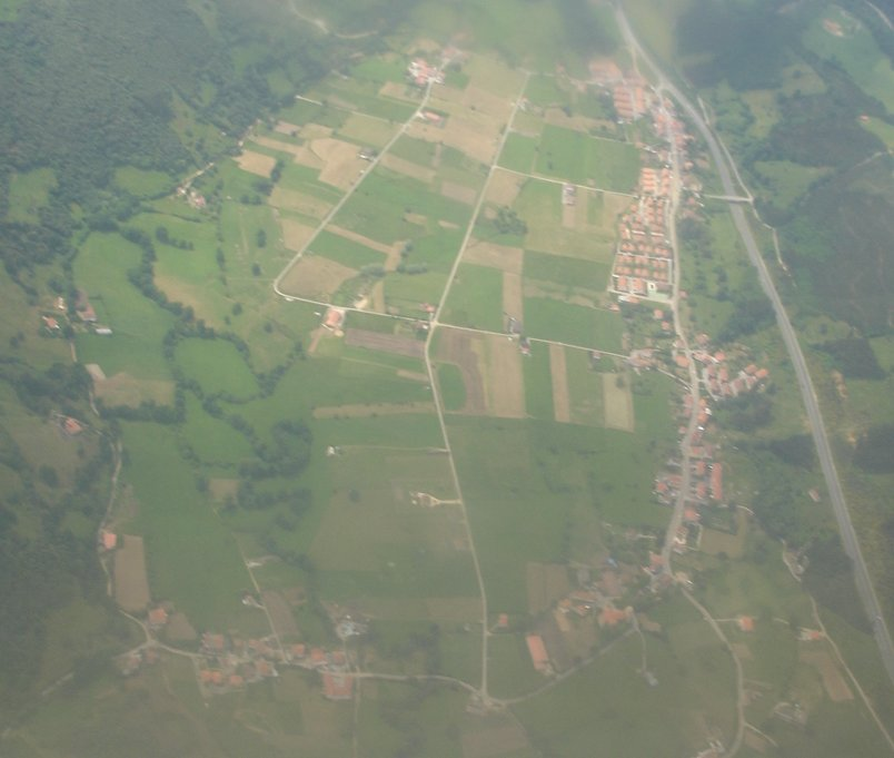 Vista aérea de Rasines (Cantabria) desde un avión comercial.